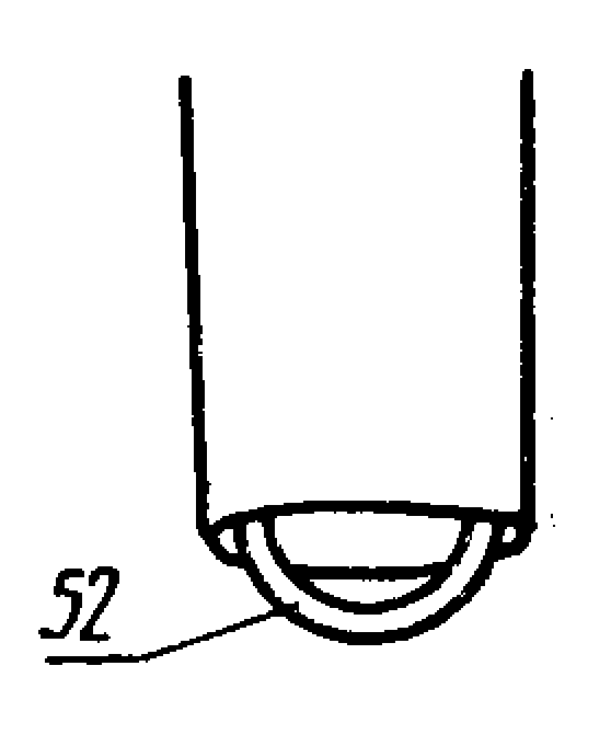 Изображение из ГОСТ 22977-89 (СТ СЭВ 6484-88) — Детали швейных изделий. Термины и определения.